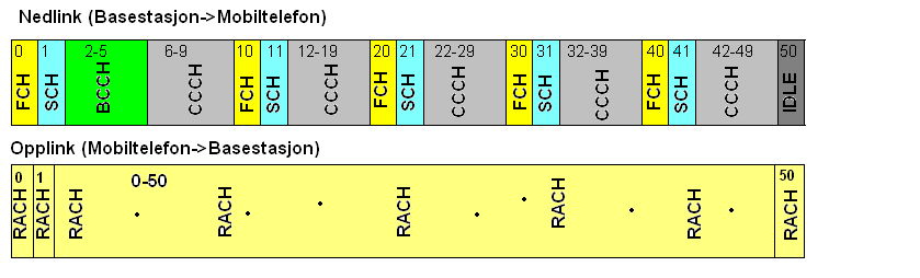 Mapping av logiske kanalar på fysiske kanalar i GSM-systemet for kontrollkanalar.